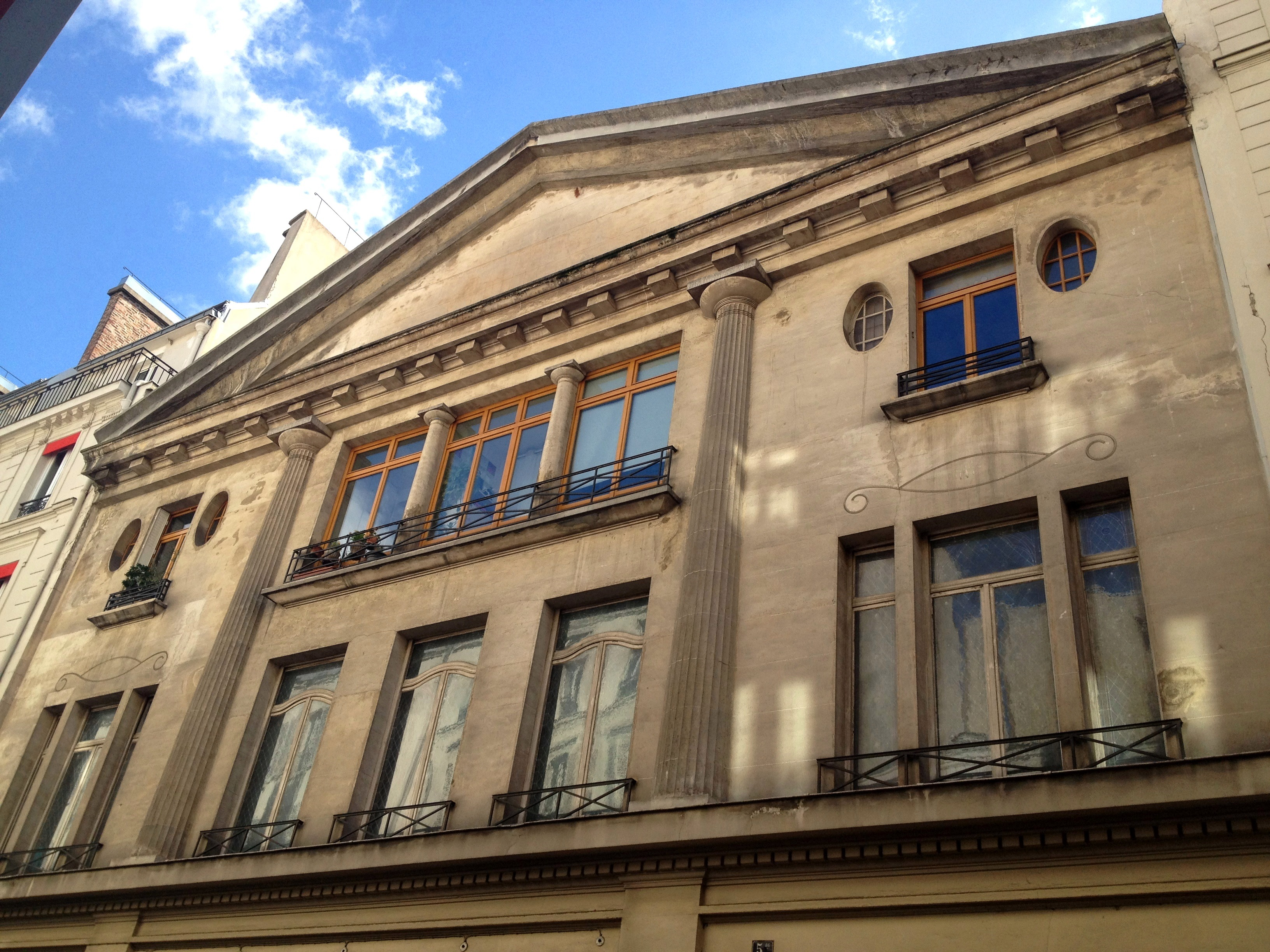 Salle Wagram (Inscrit) .